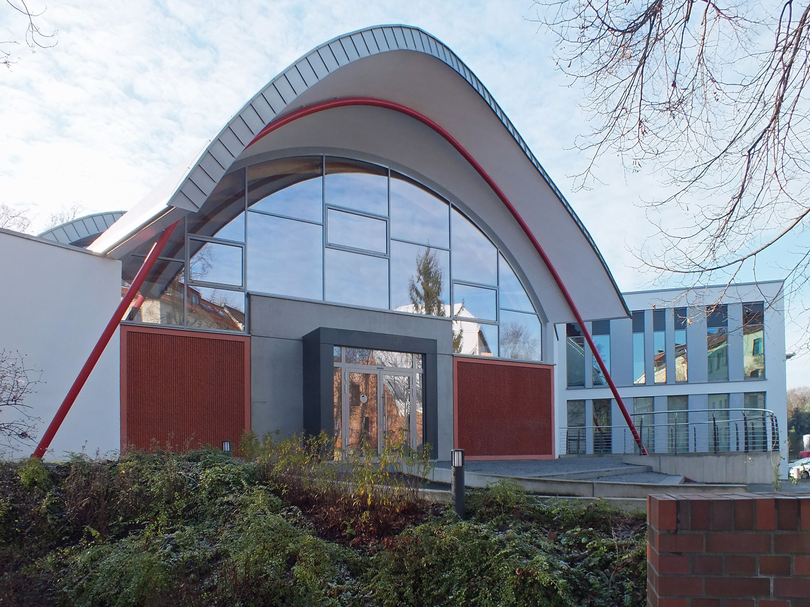 St. Elisabeth-Krankenhaus Leipzig. Eingang zum Konferenzzentrum